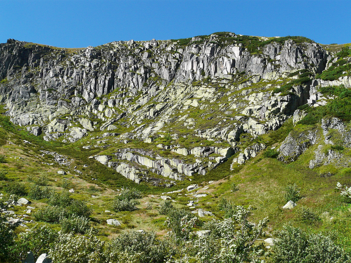 Karkonosze